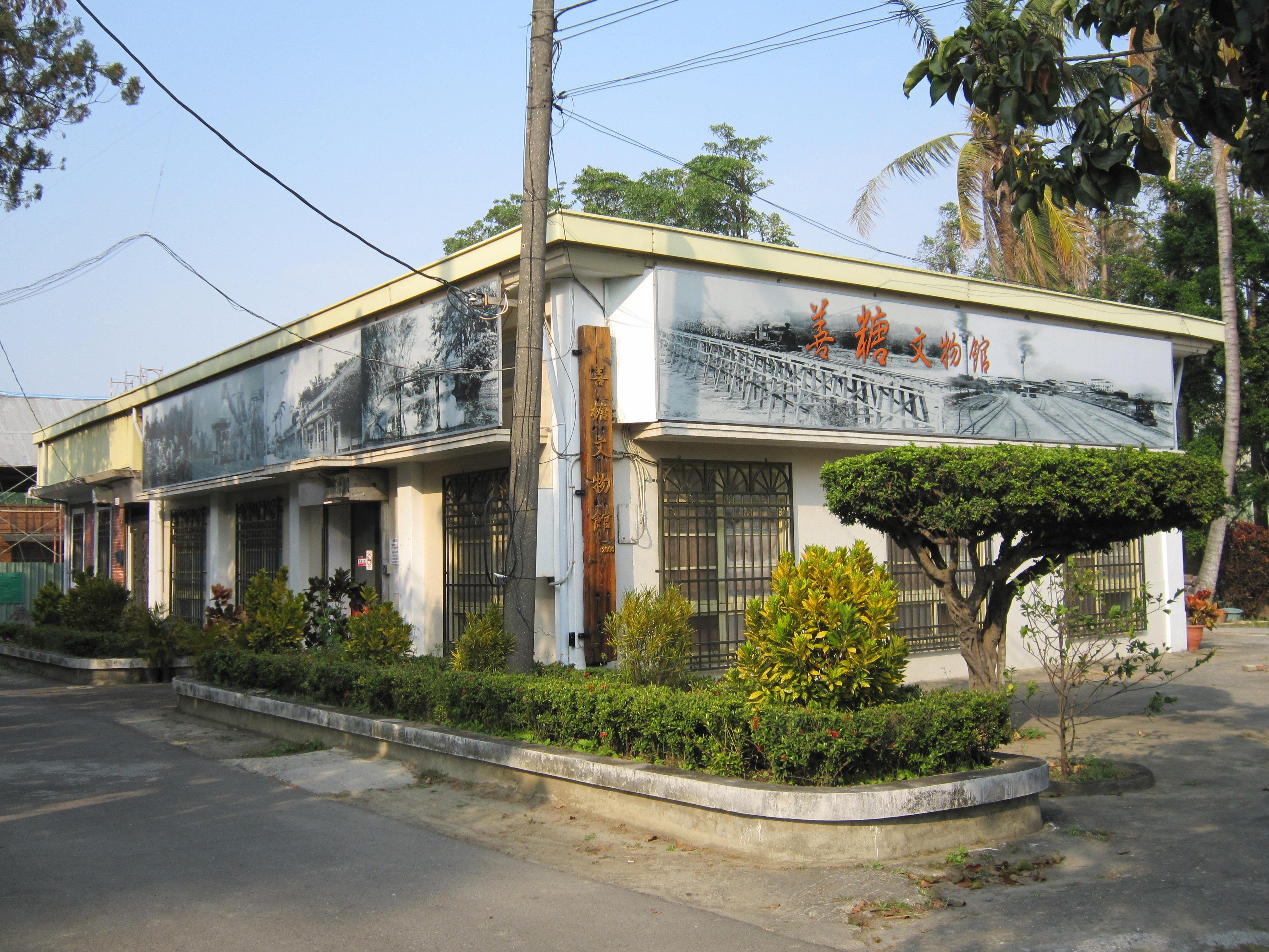 中文（台灣）: 善糖文物館。